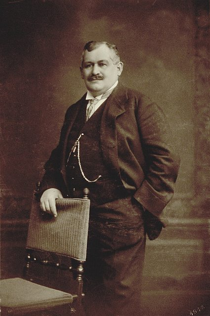 Rudolf Bruner-Dvořák (1864 - 1921), Český fotograf.